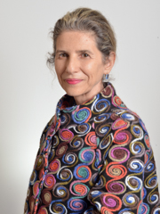 Immagine delle senatrice Vittoria Francesca Maria Bogo Deledda (XVIII legislatura)